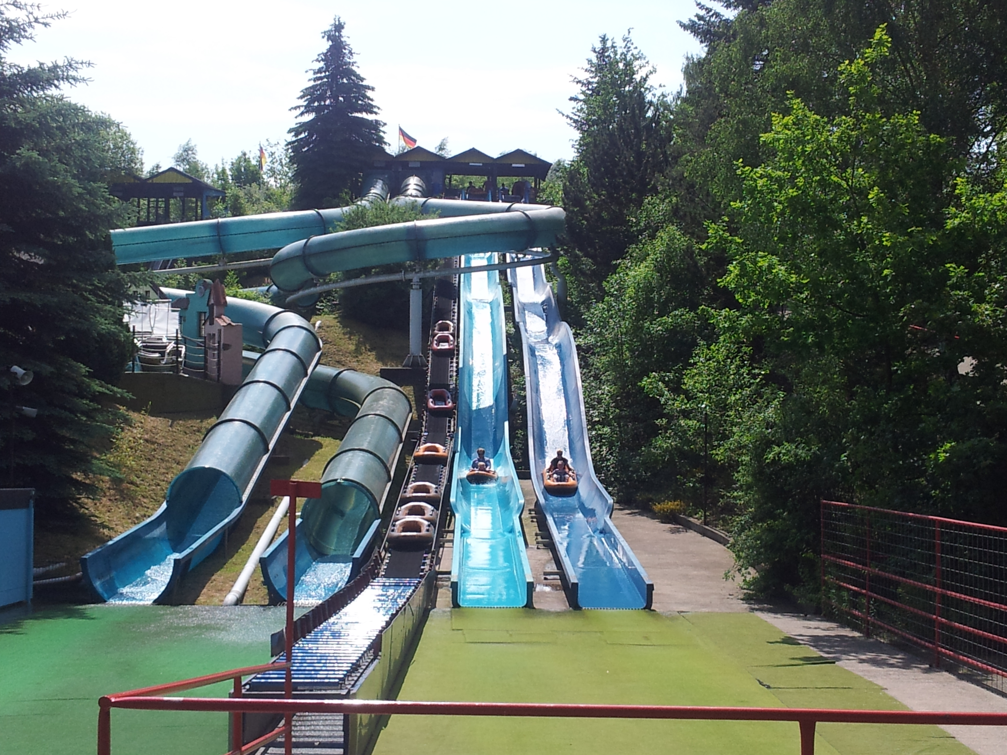 Rastiland Wasserrutschen